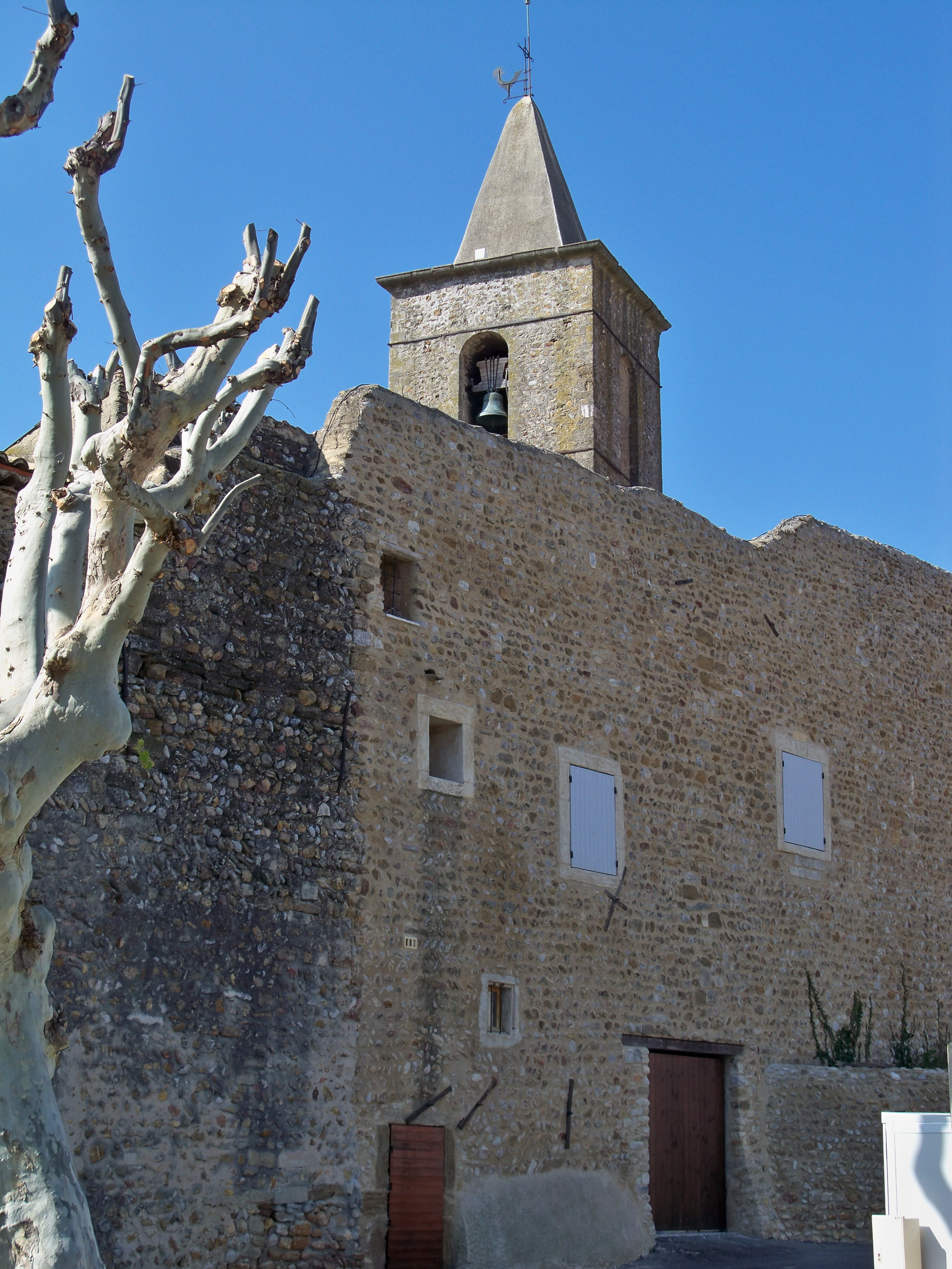 Remparts de Tulette (26)